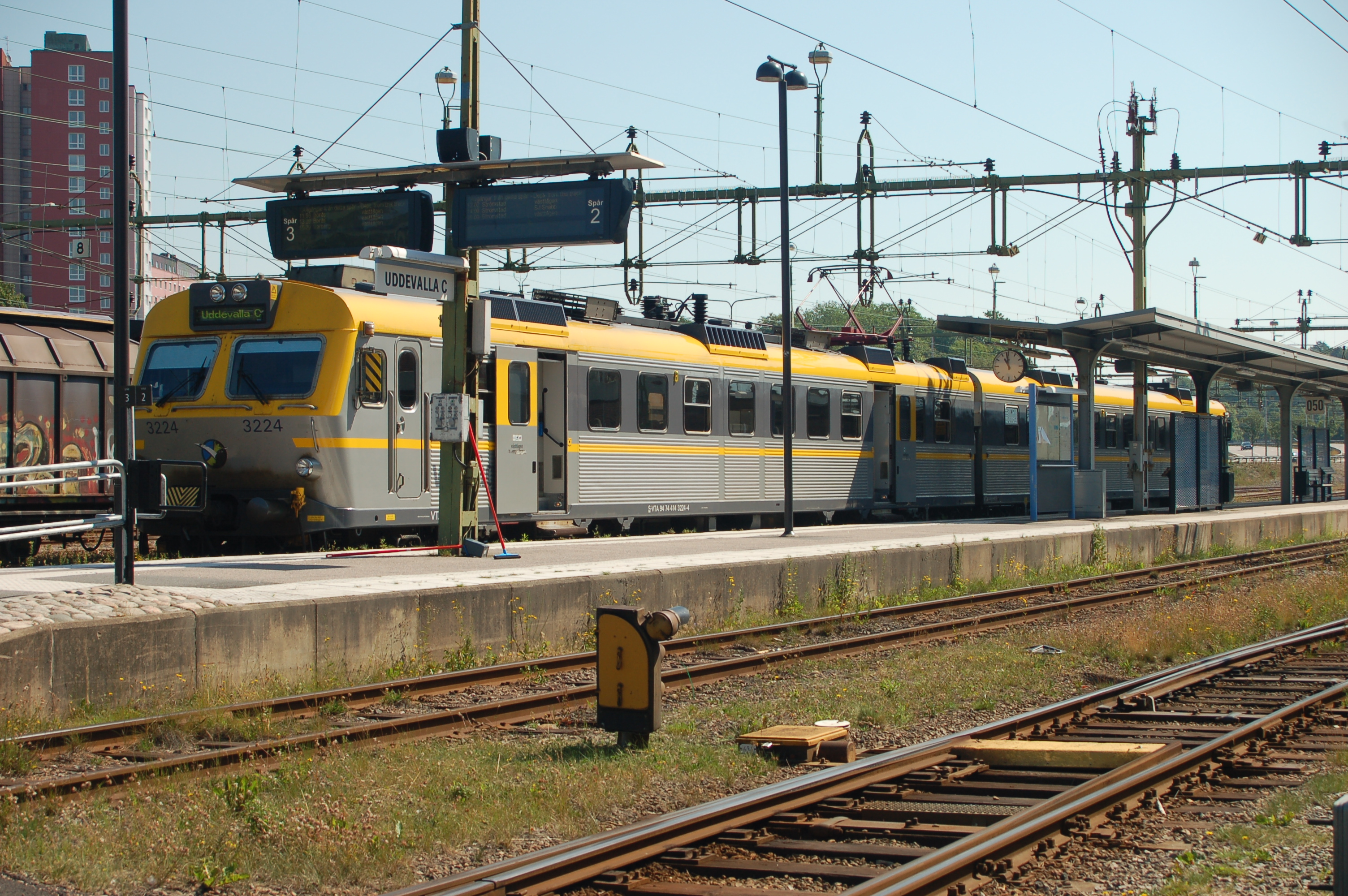 Västtrafik X14 3224 på Uddevalla C.